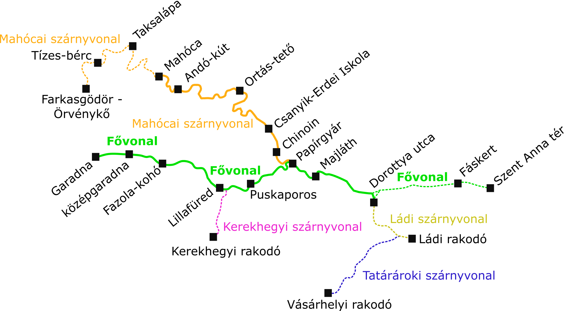 A megszűnt vonalak szaggatottal vannak jelölve. A városi szakaszon a táblás megállóhelyek nem szerepelnek.